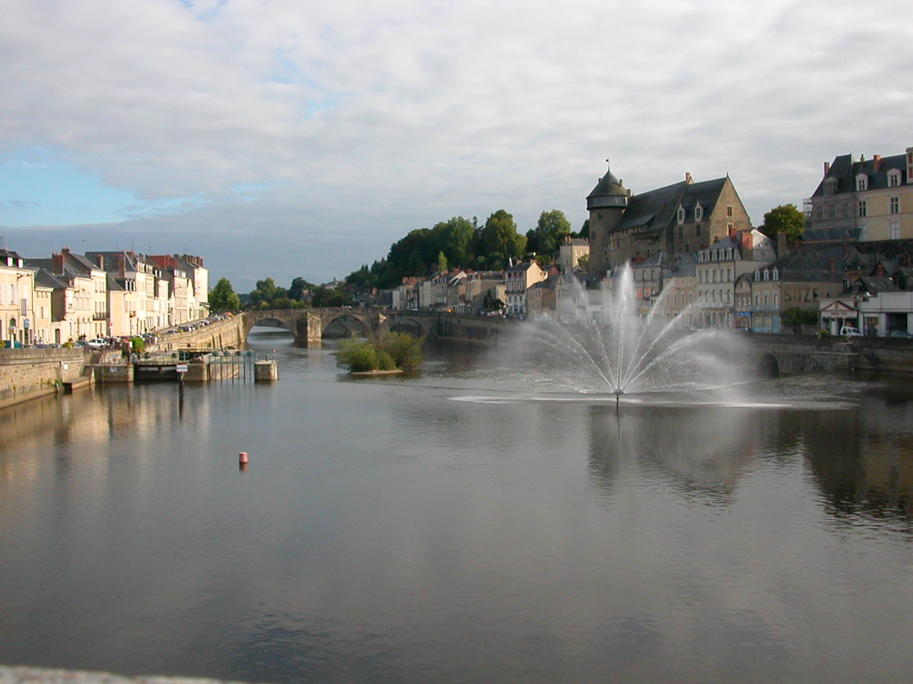 La Mayenne, le Pont Vieux et le château de Laval (Mayenne)